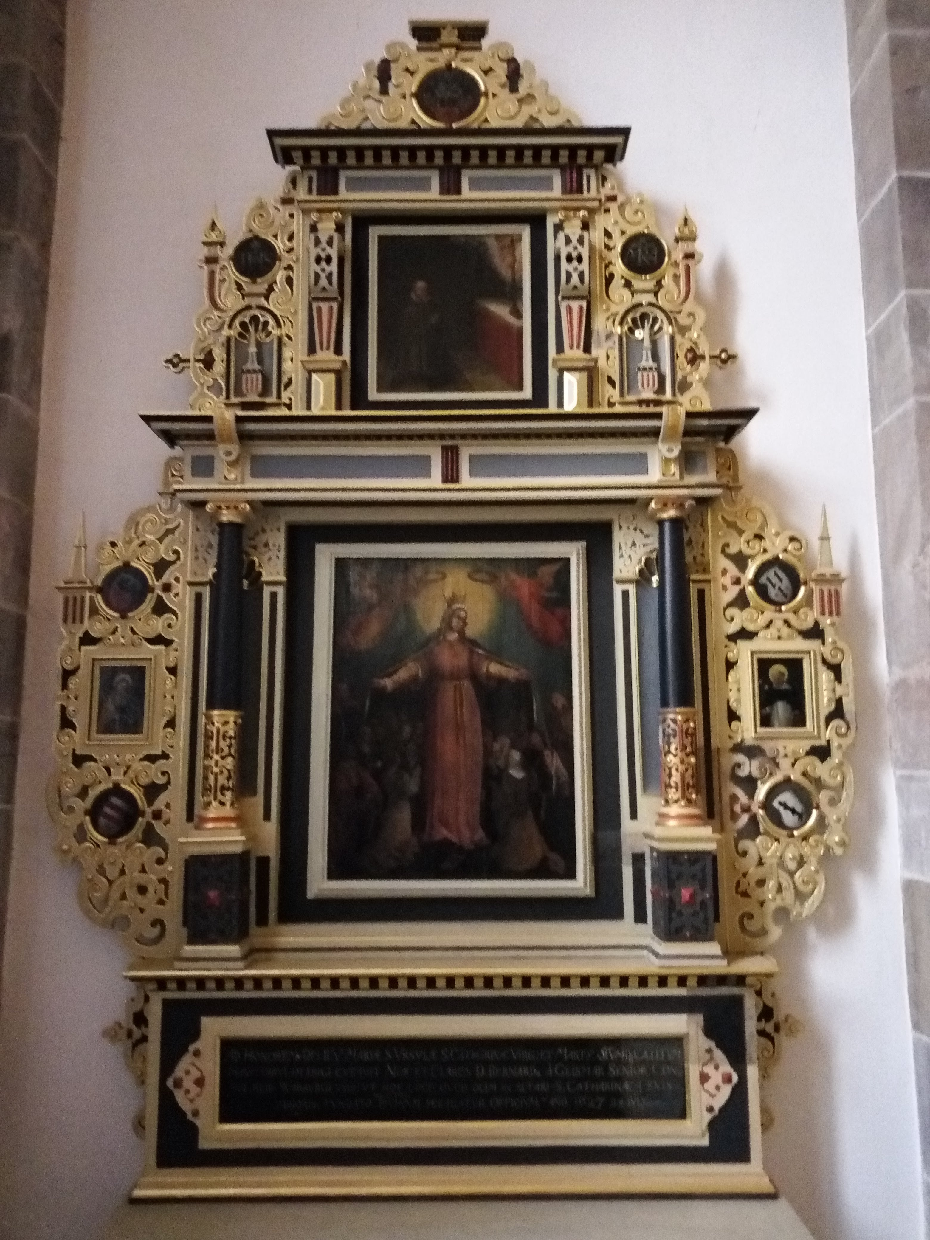 Geismar-Altar in Warburg St.Johannes Bapt.